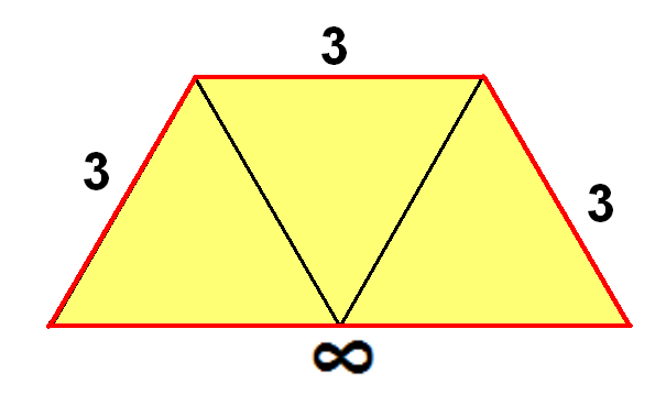 Infinite antiprism vertex figure